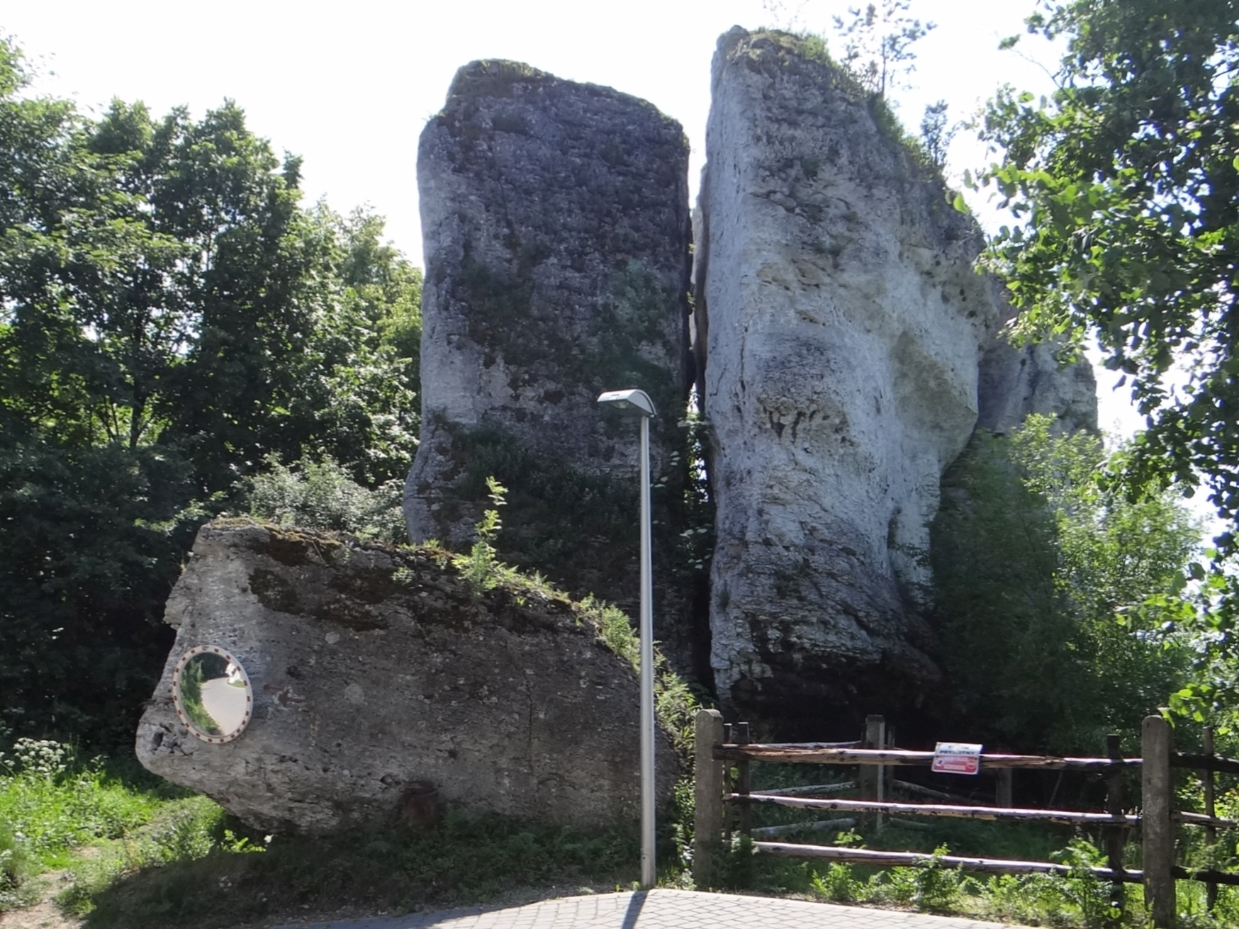 Grań za Kapeluszem w Podzamczu